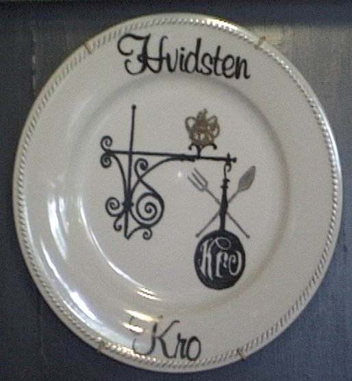 Hvidsten Kro. Symbol på tallerken. Taget 2002 af Hans Jørn Storgaard Andersen